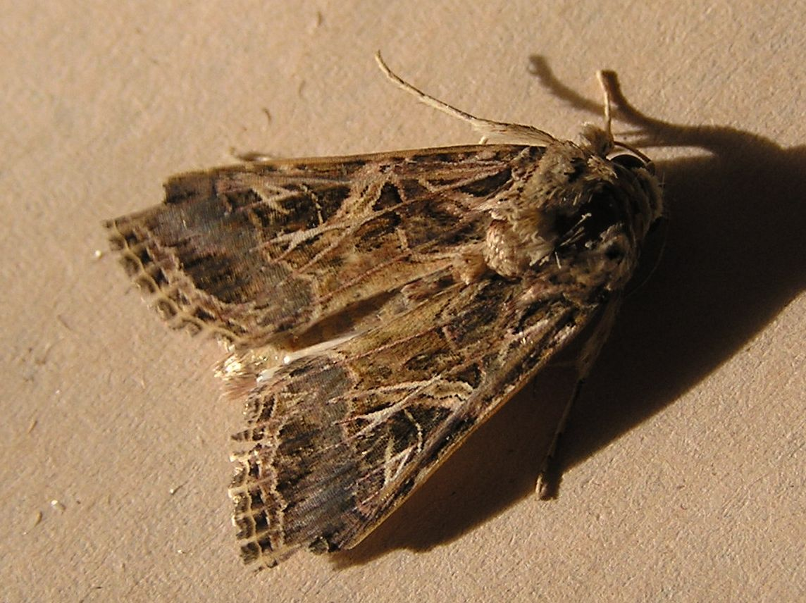 Spodoptera littoralis, taken in Jerusalem, Israel